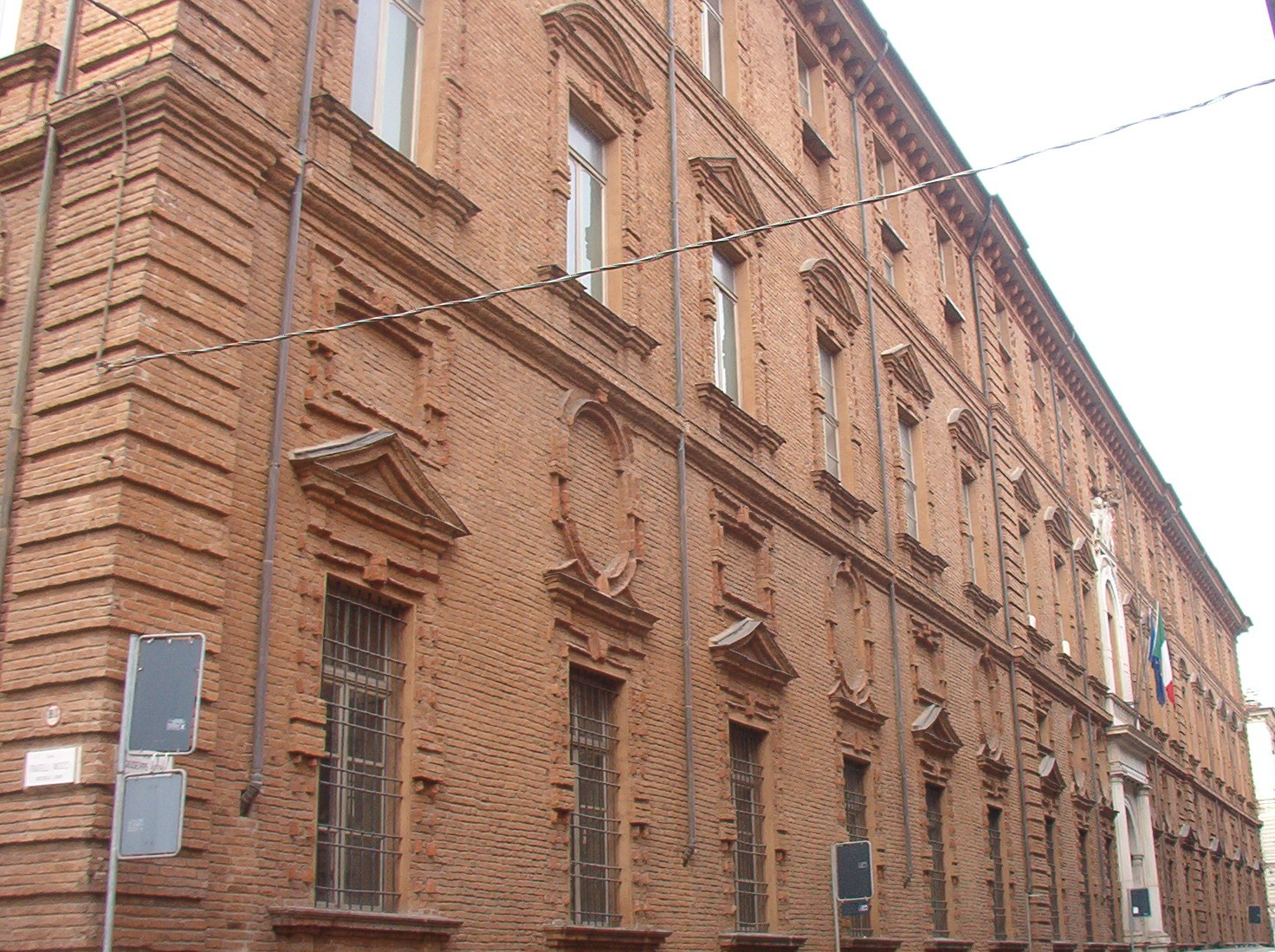 Palazzo dell'Università - Torino - Italia